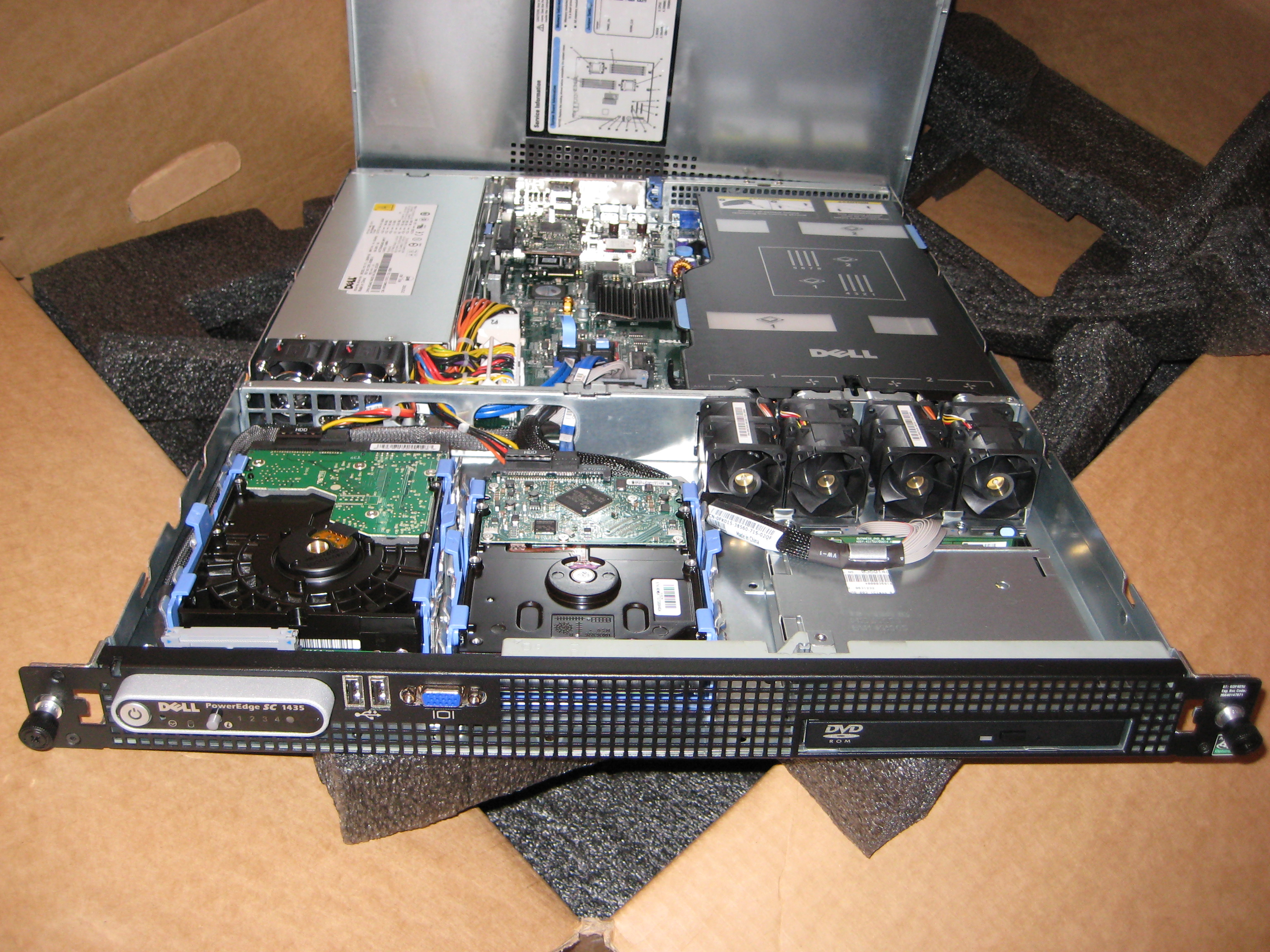 Servidor de Linux y Windows